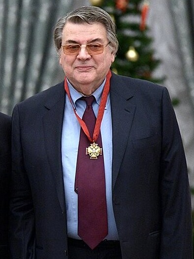 Александра Ширвиндт